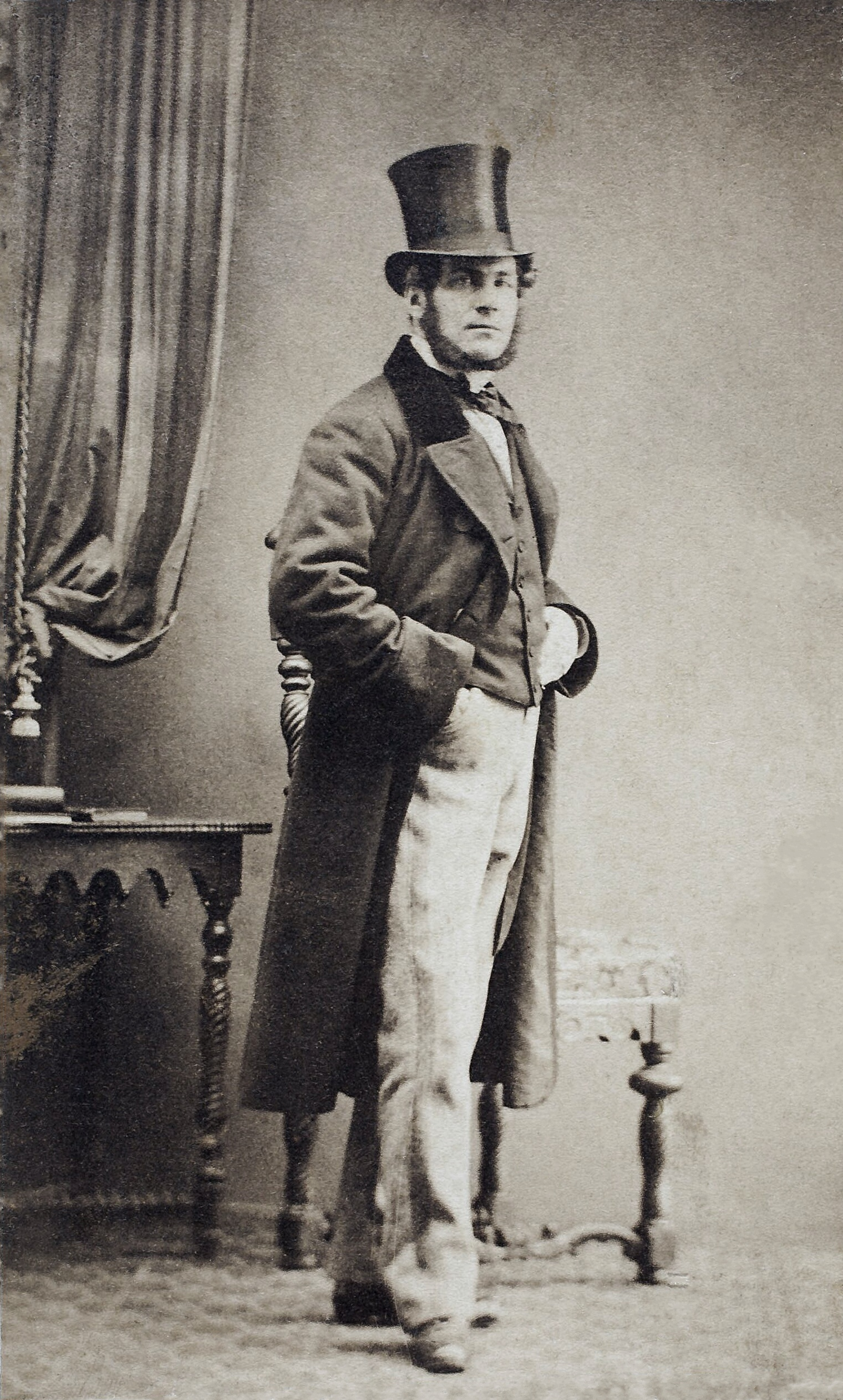 Johannes Marius Janszen (1814-1879), burgemeester van Loosduinen